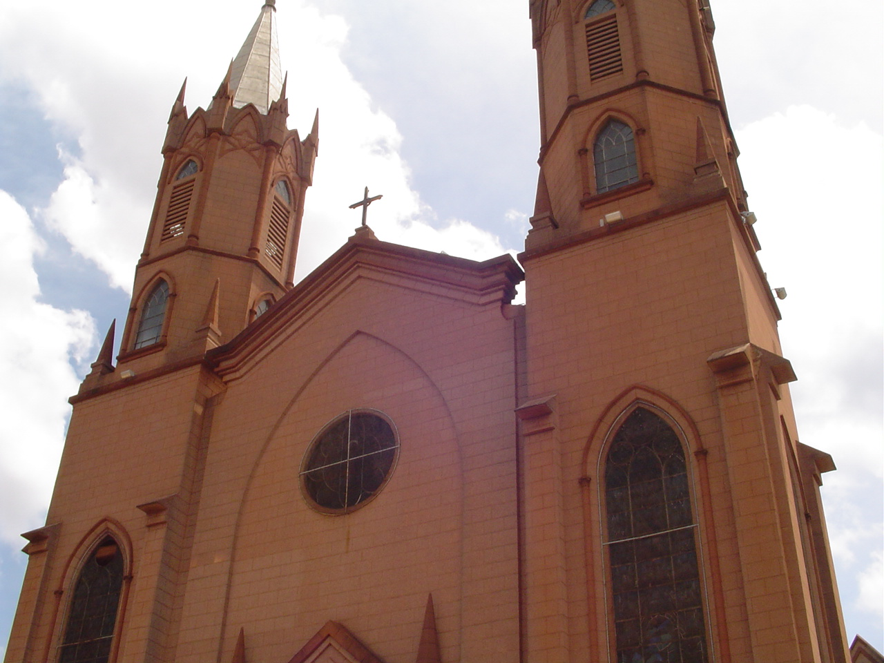 Catedral Bom Jesus de Ourinhos